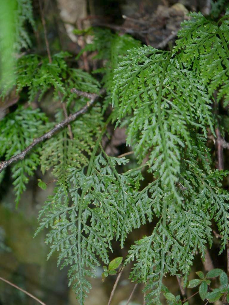 Asplenium ritoense：コウザキシダ 2014/10/25 和歌山県すさみ町：Susami Town. Wakayama Pref. Japan